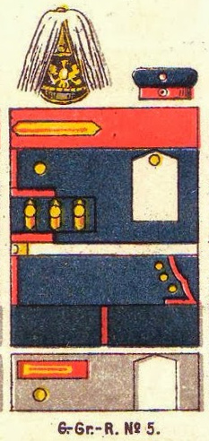 Schematische Farbdarstellung der Uniform des Garde-Grenadier-Regiments Nr. 5